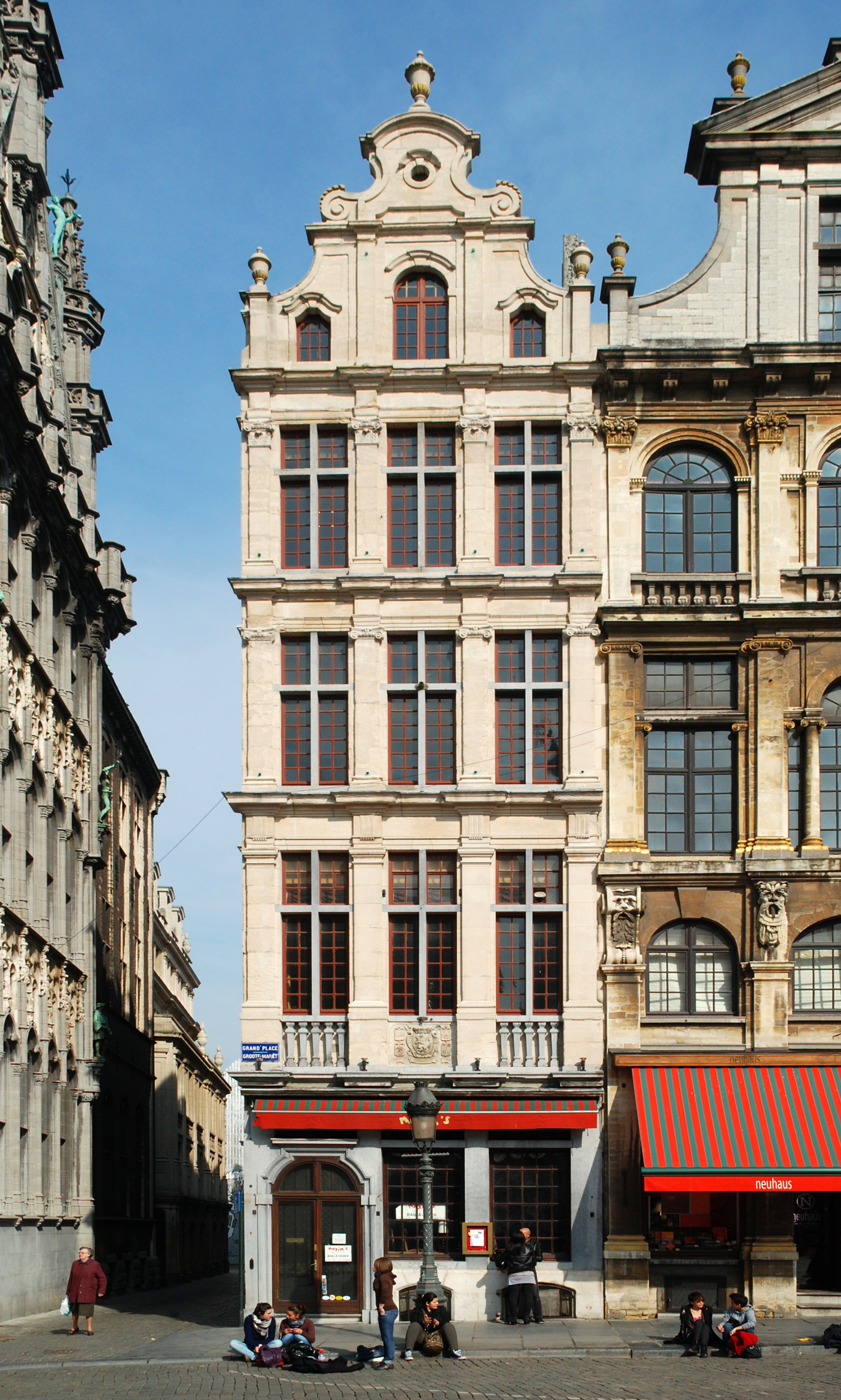 Belgique - Buxelles - Grand-Place - Maison du Marchand d'Or (façade avant restauration 2012)